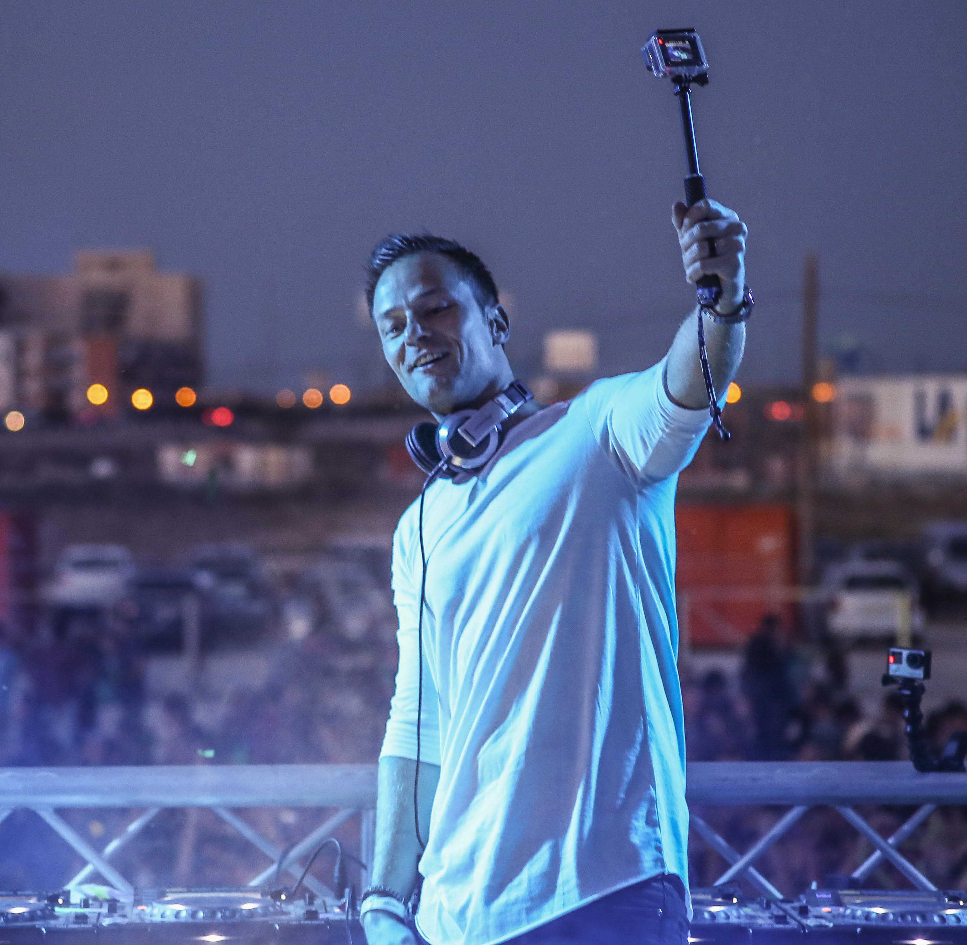 Paellas Festival Alicante 2016